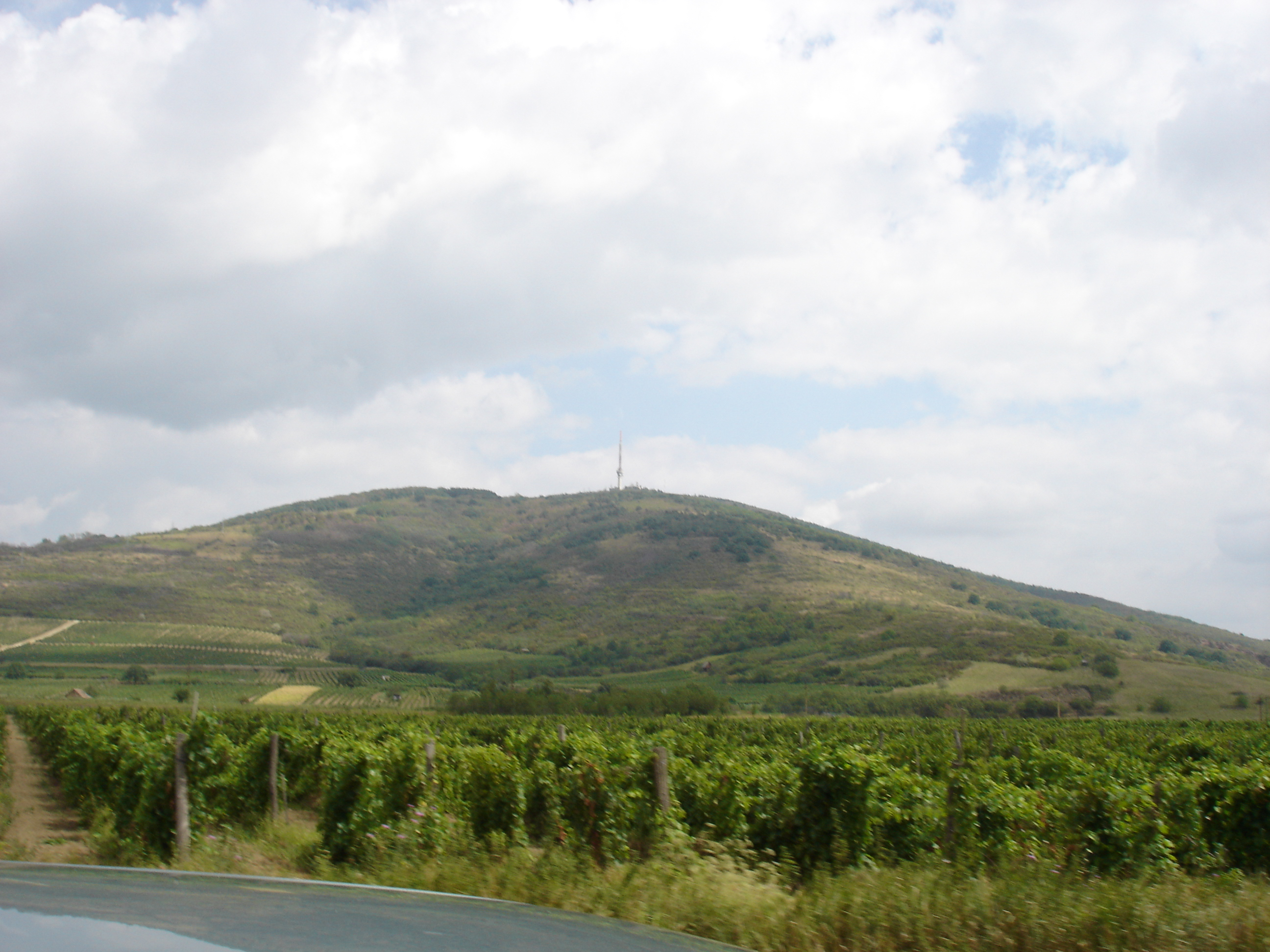 kajina v okoli Tokaje - landscape around Tokaj - Hungary